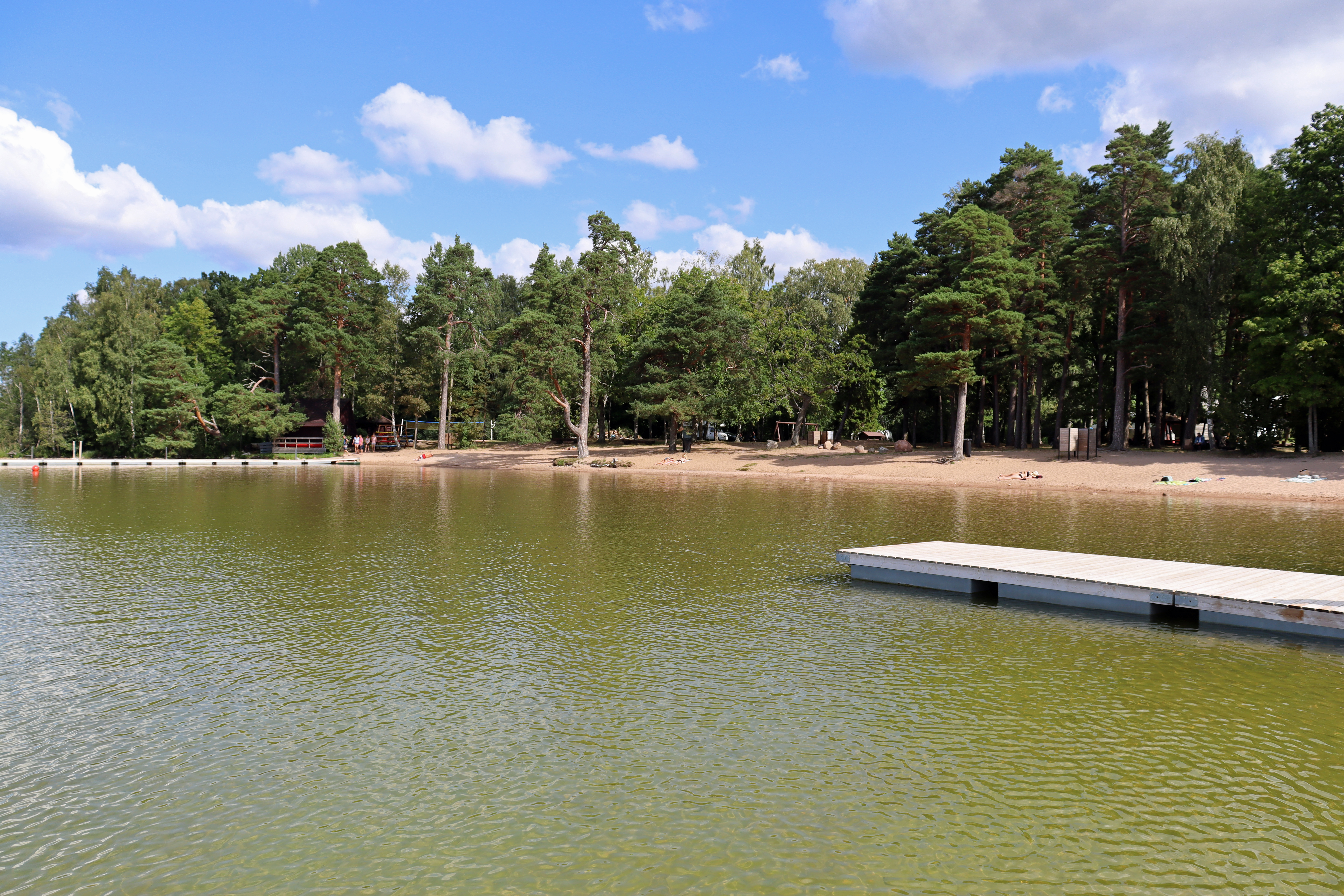 Пляж на озере Каруярв. Эстония